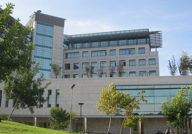 הבניין החדש של הפקולטה למדעי המחשב בטכניון.